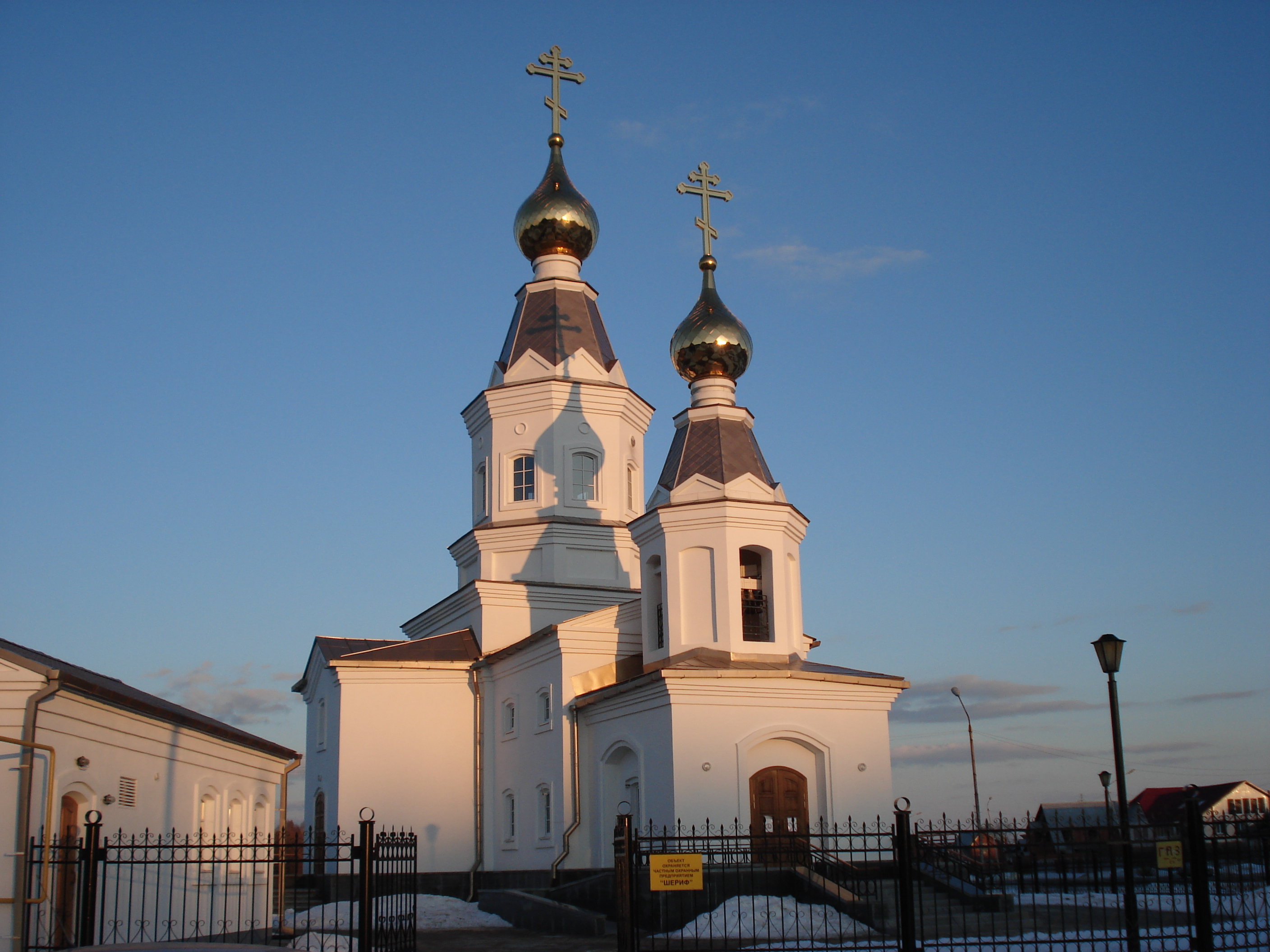 Съемка храма во имя святого благоверного князя Александра Невского фотоаппаратом Сони.